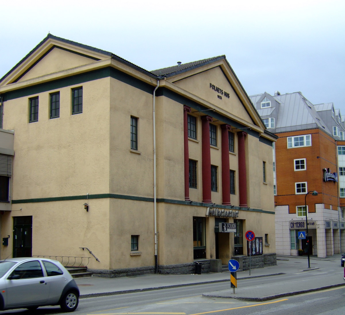 Folken